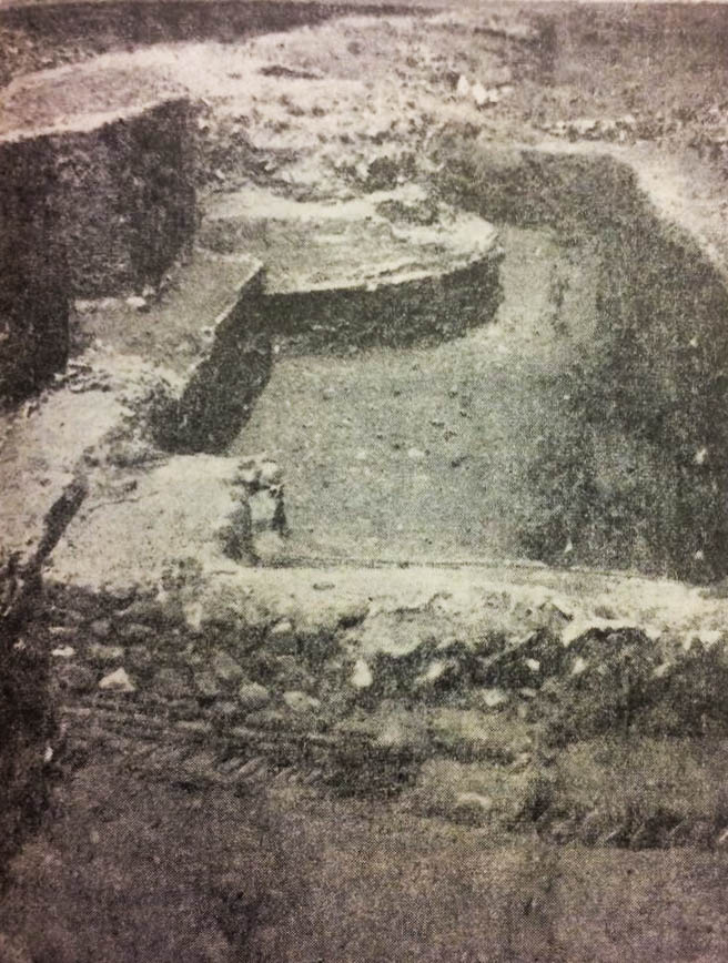 Qədim Gəncə qalasının ikinci divarı ərazisində qazıntı işləri, 1938